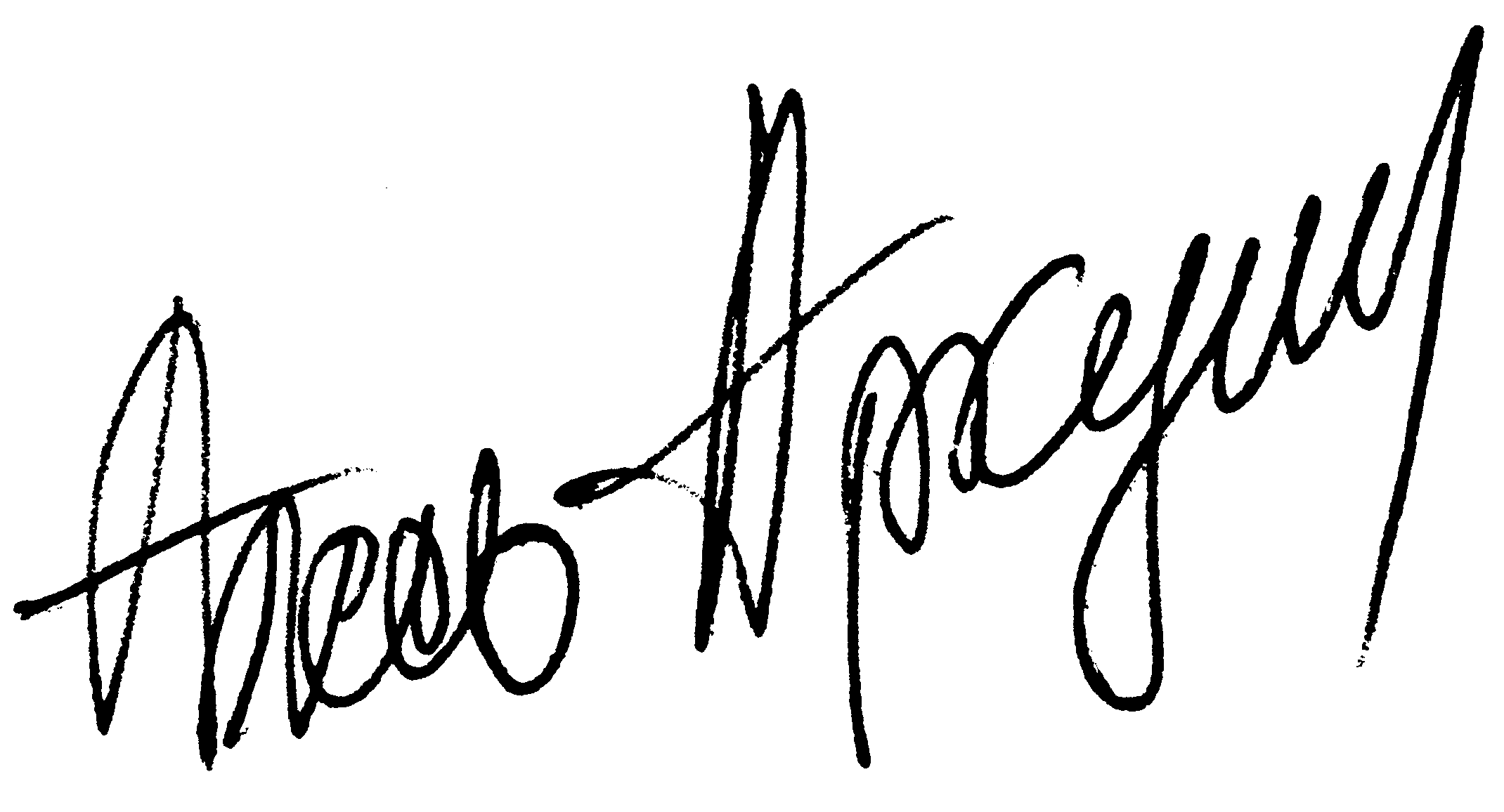 Podpis Alesia Arkusza wykonany 24 października 2012 roku.